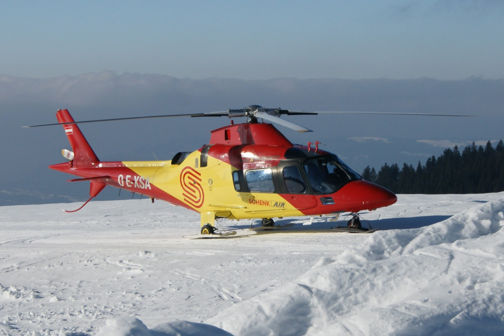 Agusta A109 Power der Schenkair [1] in Warteposition zur Bergung eines Skiunfallopfers neben der Gehrenalpe am Hochhäderich in Hittisau.